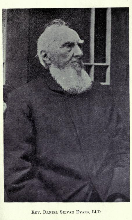 Yr Offeiriad, geiriadurwr a bardd Daniel Silvan Evans (1818-1903).